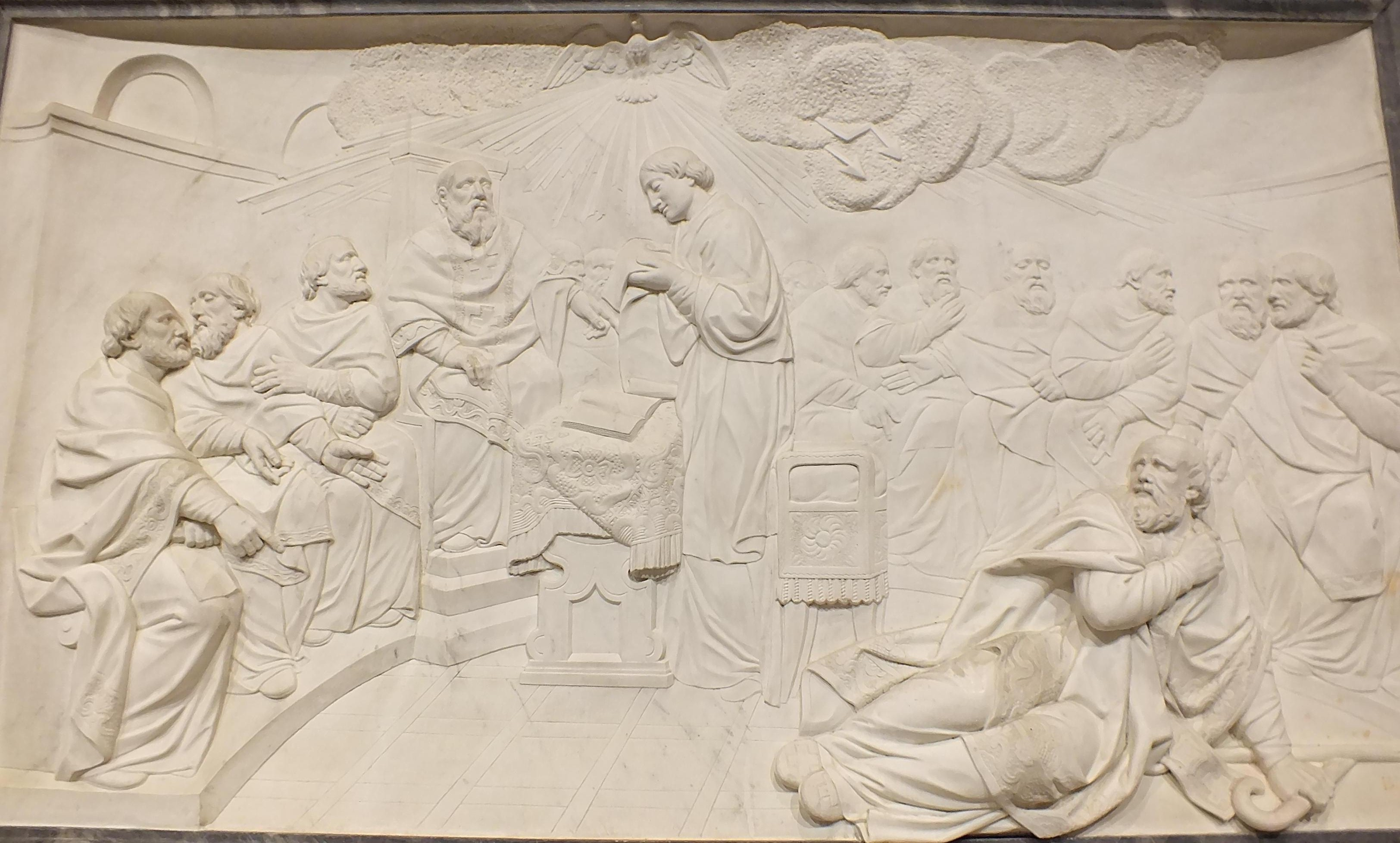 Bas relief, sculpté en 1787 par Charles-Antoine Bridan, situé dans le chœur de la cathédrale Notre-Dame de Chartres.